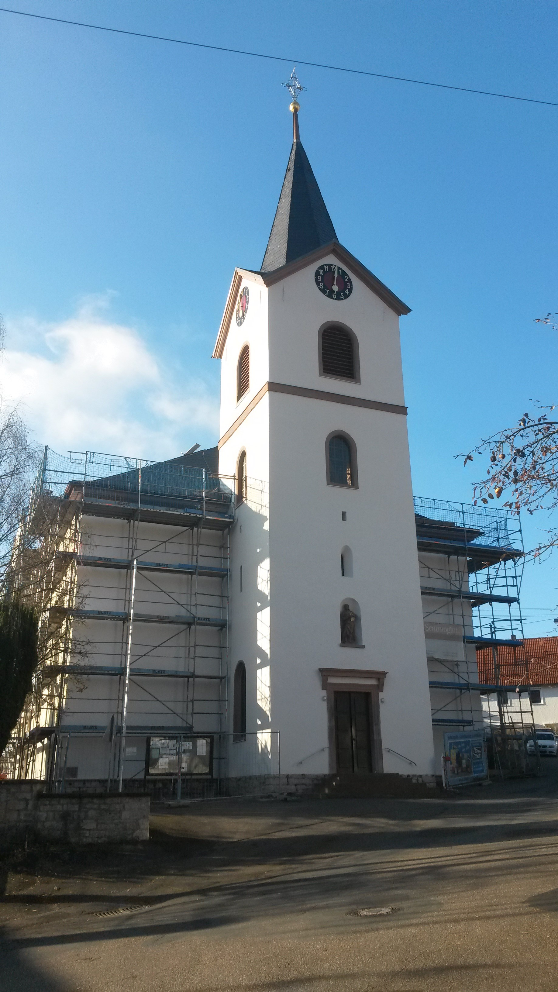 Außenansicht der St.-Markus-Kirche in Unterbalbach